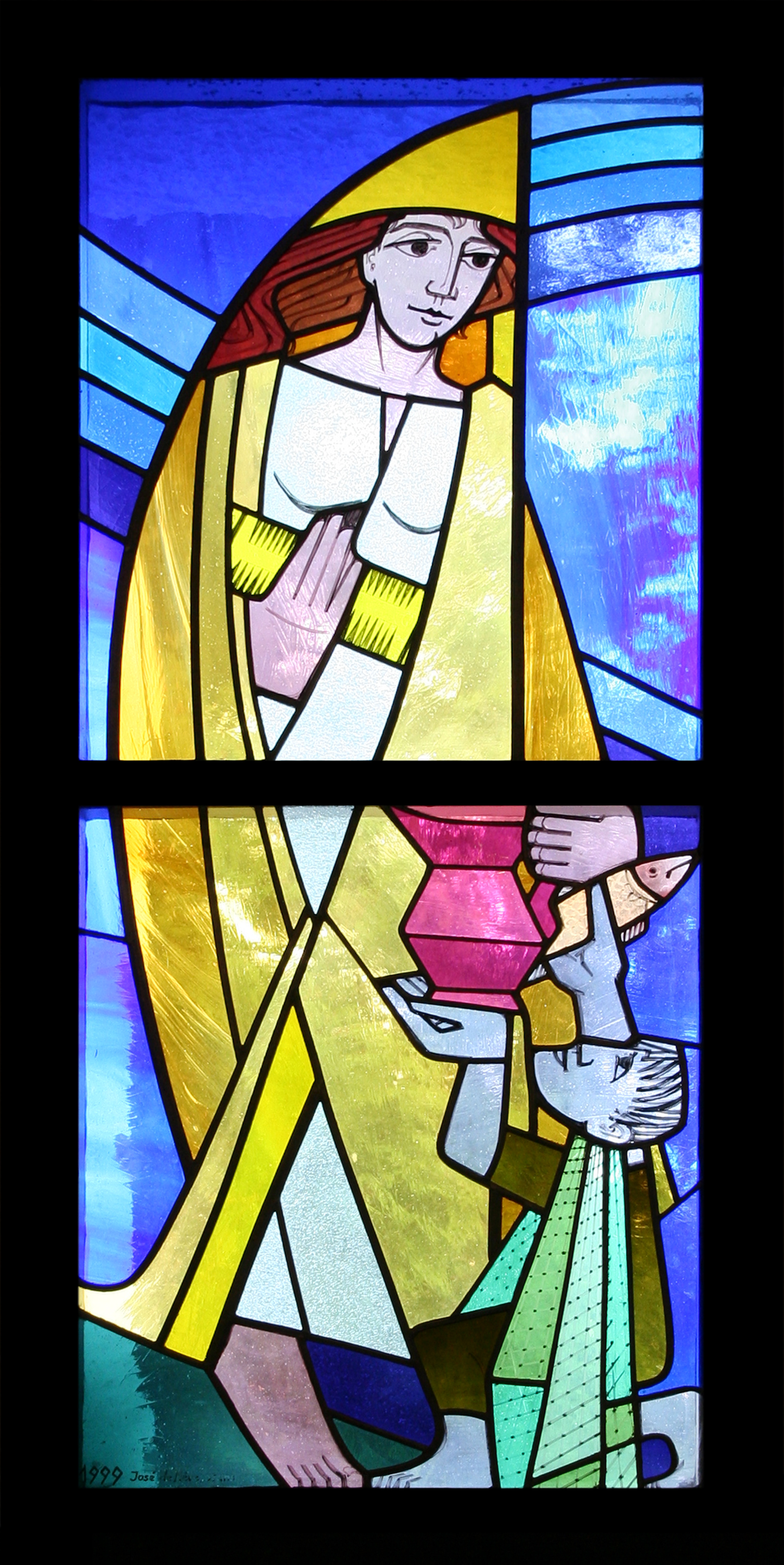 Römisch-katholische Pfarrkirche St. Martin Zürich-Fluntern, Glasfenster von Jose de Neve